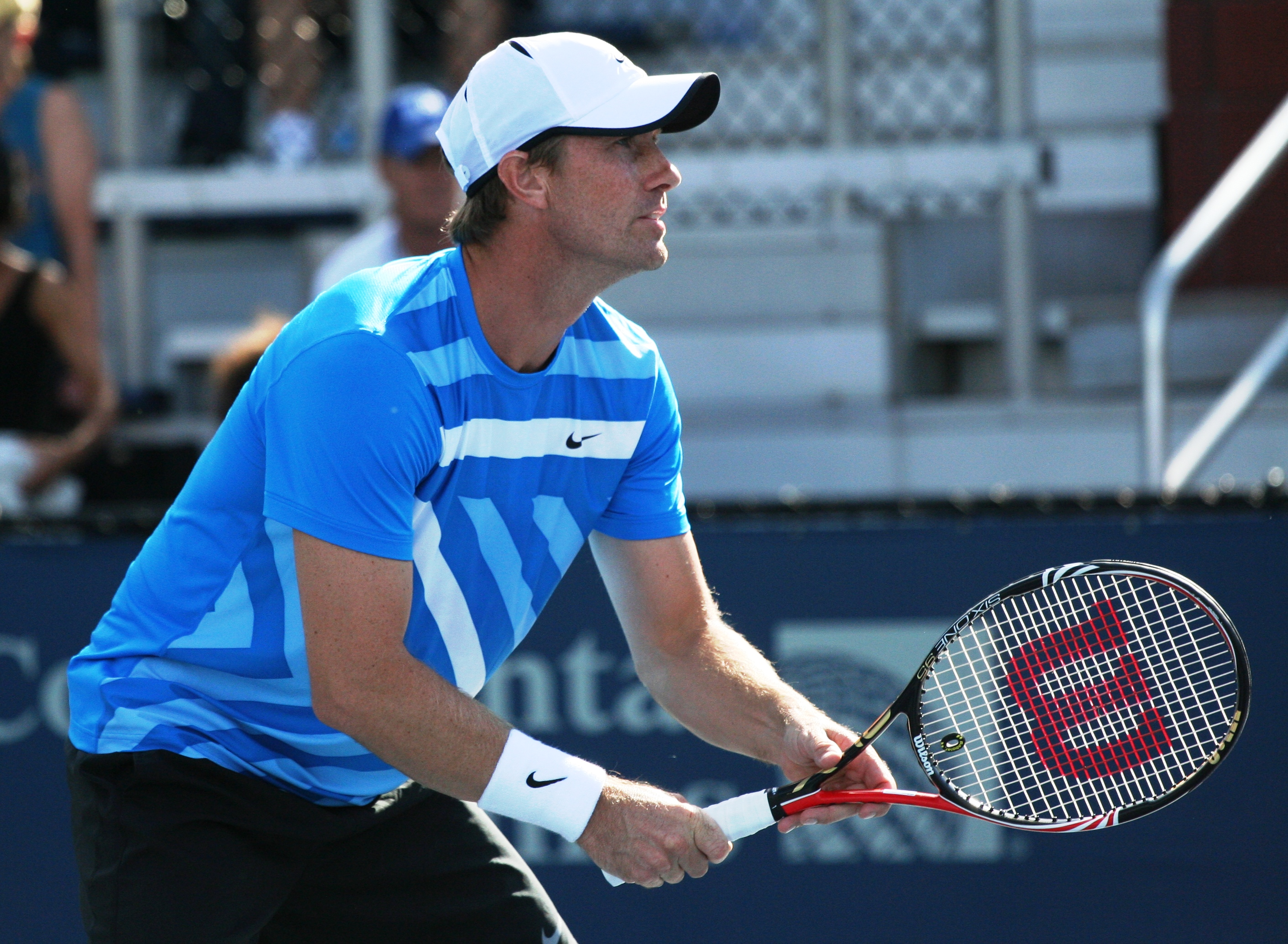 U.S. Open Saturday, Sept. 4, 2010